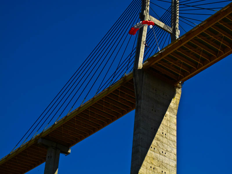 Salto BASE desde puente Mezcala